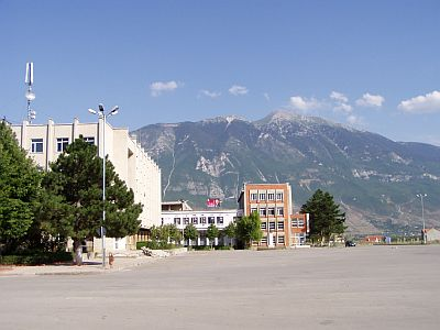 Kukës 2 (Albania)